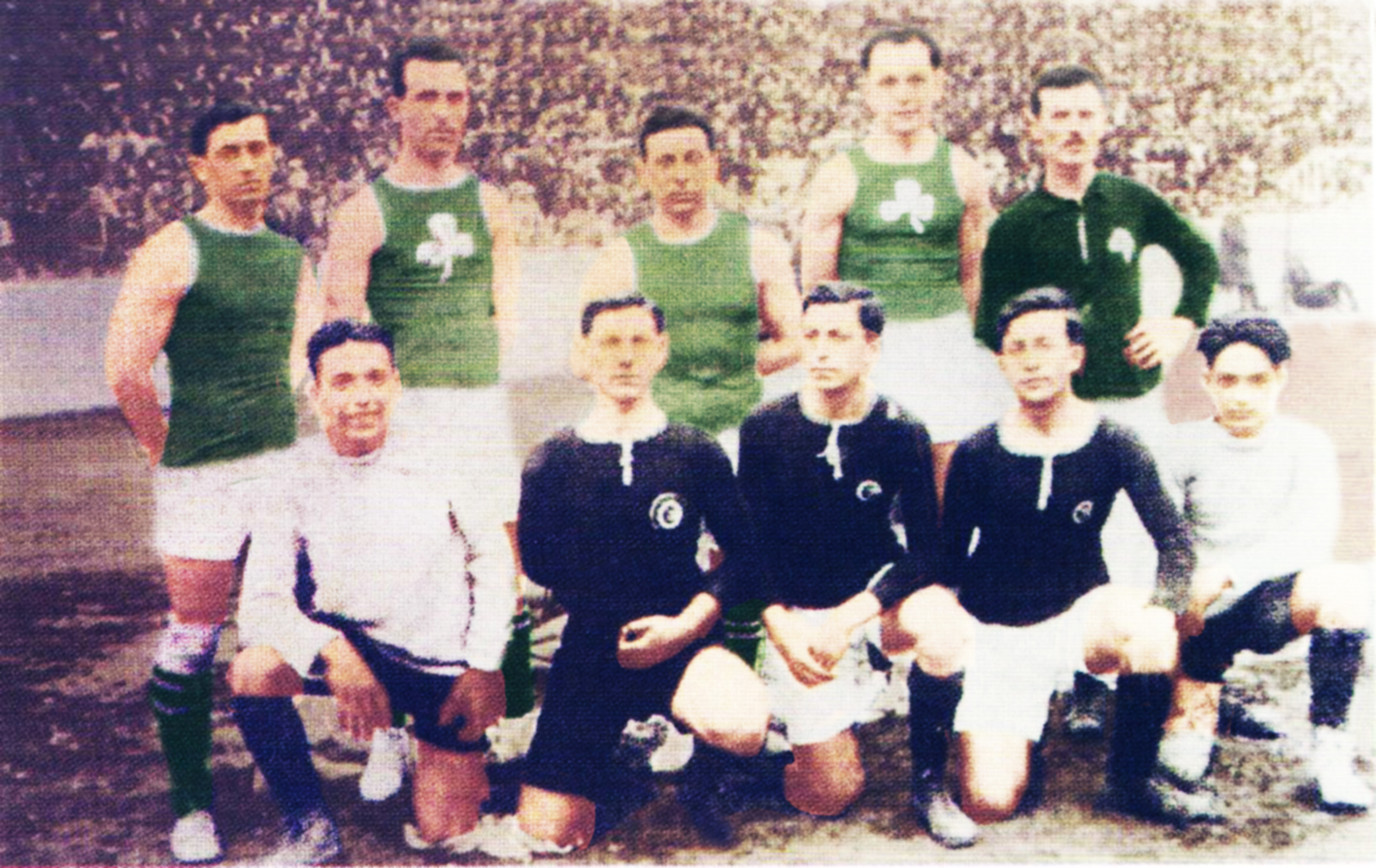 Οι ομάδες μπάσκετ του Παναθηναϊκού και του Εθνικού ΓΣ το 1921 Στην επάνω σειρά οι αθλητές του Παναθηναϊκού, Λουκάς Πανουργιάς, Γιάννης Σταυρόπουλος, Γιώργος Καλαφάτης, Απόστολος Νικολαΐδης, Λεωνίδας Καλογερόπουλος. Στην κάτω σειρά οι αθλητές του Εθνικού ΓΣ.